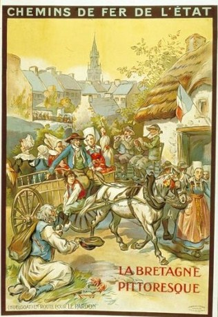 Affiche touristique éditée par les Chemins de fer de l'Etat dans la décennie 1920 et représentant le Pardon du Huelgoat. Illustre la vision touristique de la Bretagne à l'époque (costumes bretons, sonneurs, char-à-bancs, mendiant, ..)